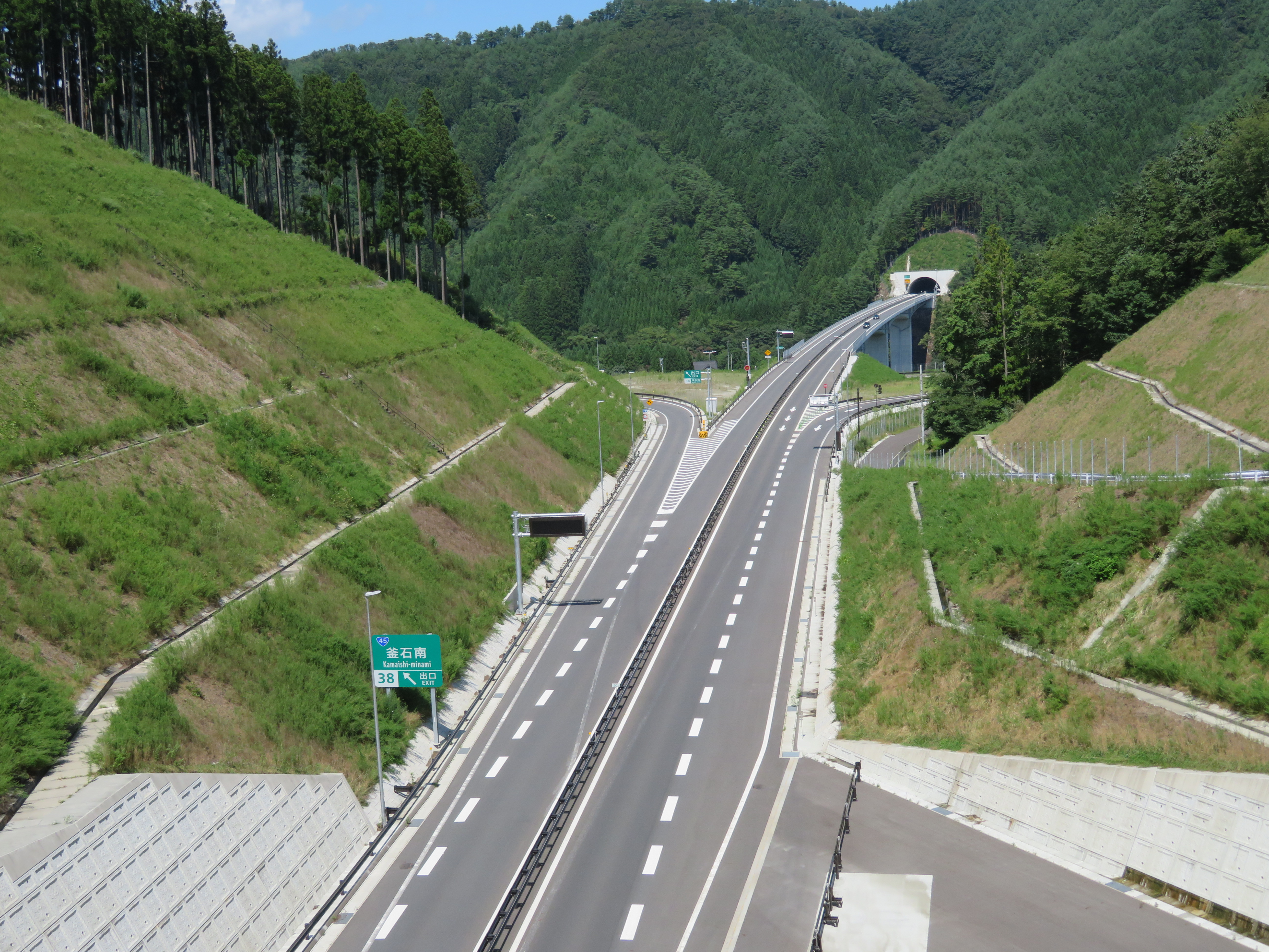 三陸自動車道 釜石南インターチェンジ出入口付近